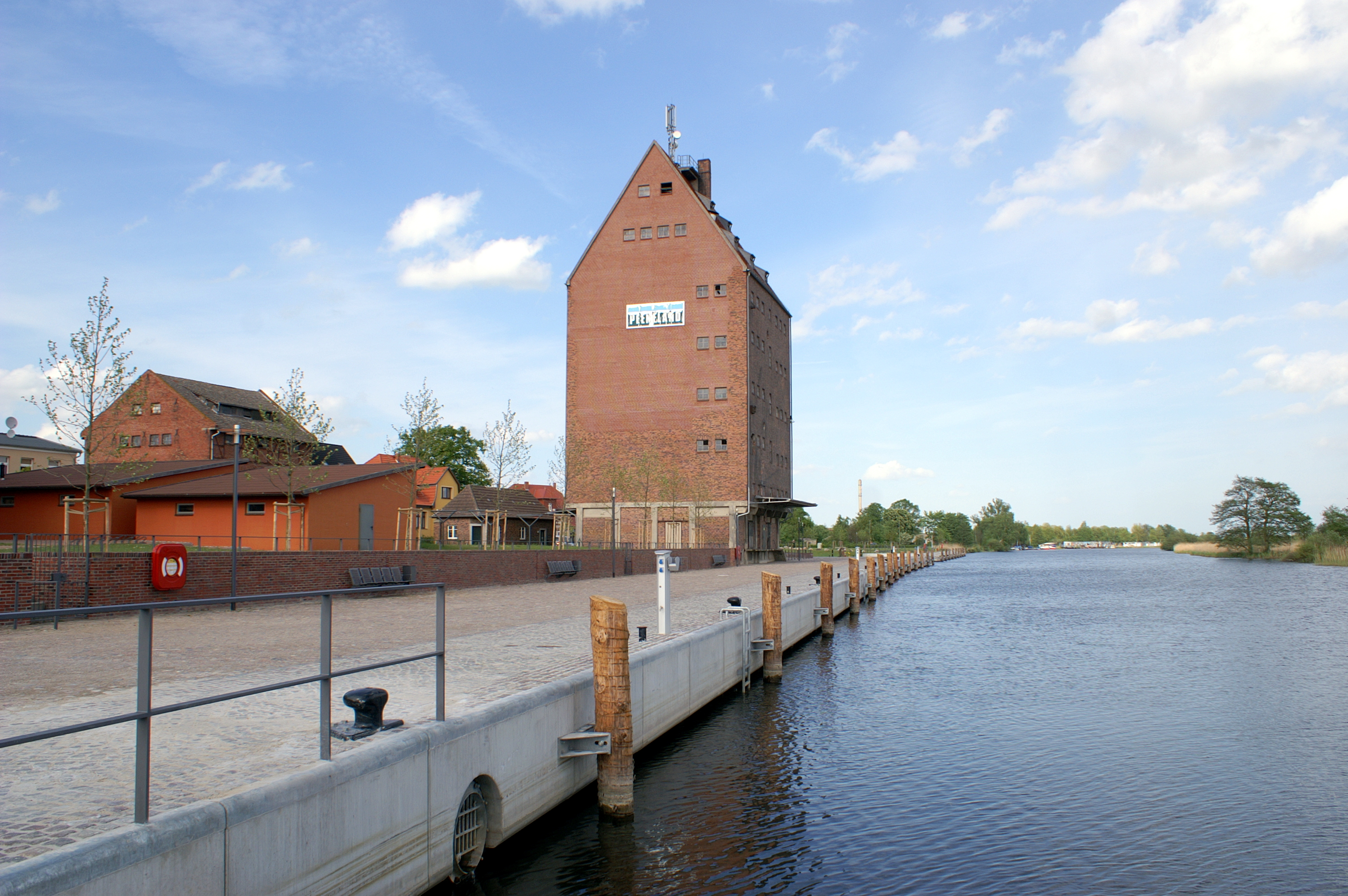 Loitz, Landkreis Vorpommern-Greifswald, Hafen mit Kornspeicher